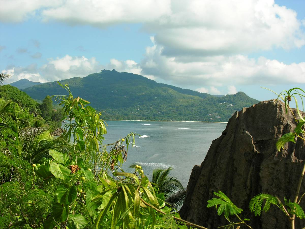 Seychelles, Mahé Island